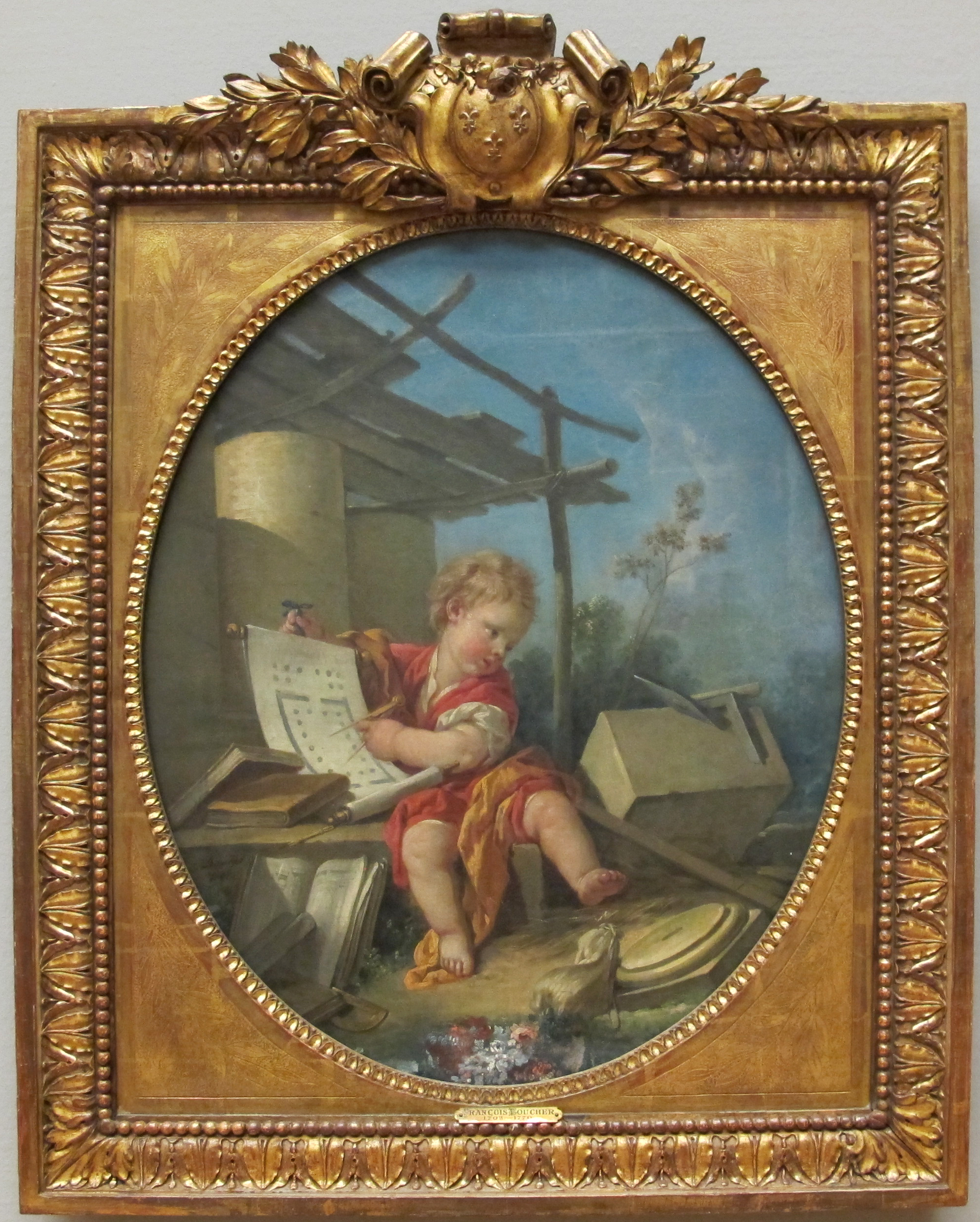 allegoria delle arti liberali, l'architetturatitle QS:P1476,it:"allegoria delle arti liberali, l'architettura" label QS:Lit,"allegoria delle arti liberali, l'architettura"